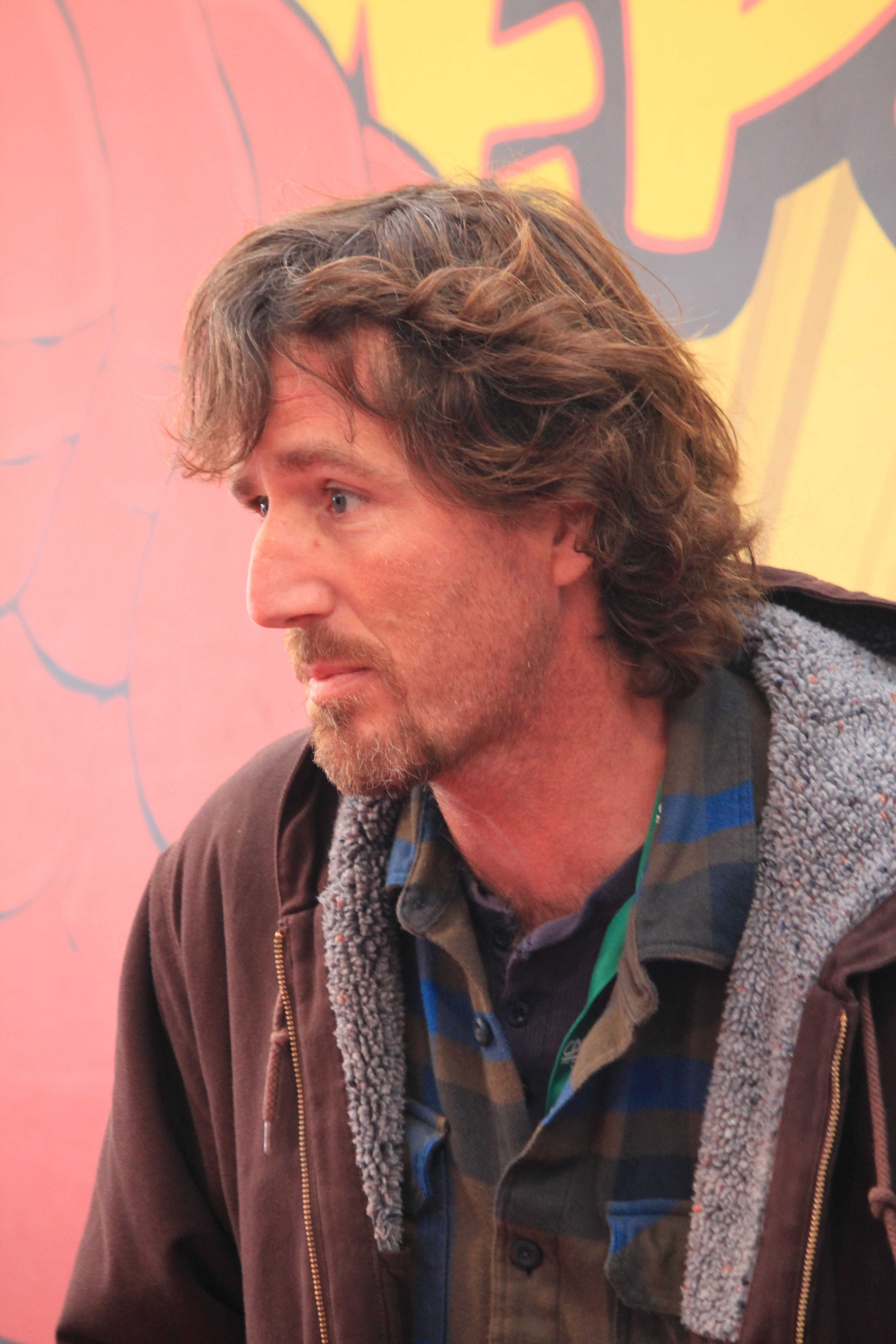 Christophe chabouté lors de Quai des Bulles à Saint-Malo le 27 octobre 2012.